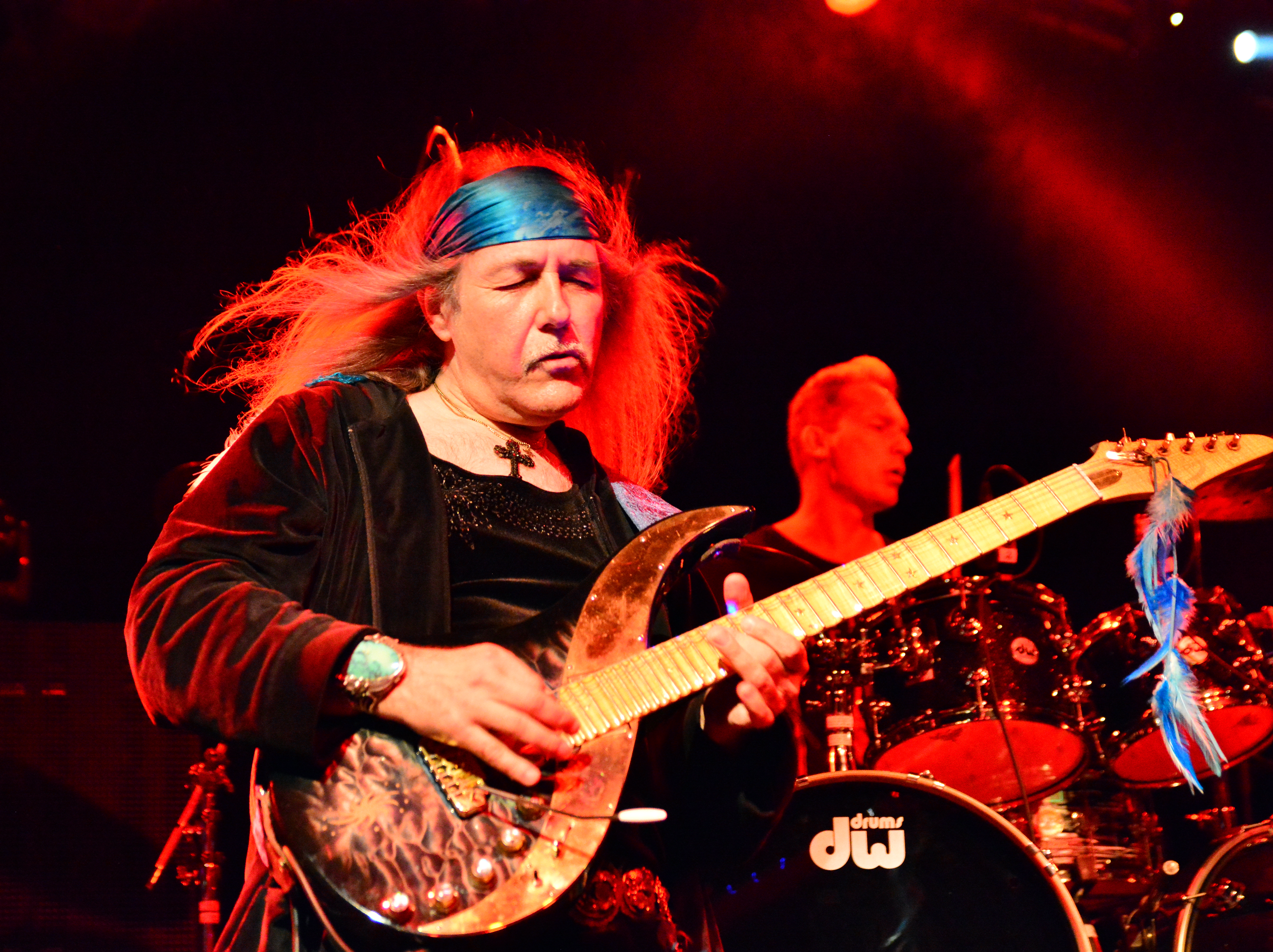 Uli Jon Roth bei den Hamburg Metal Dayz 2015